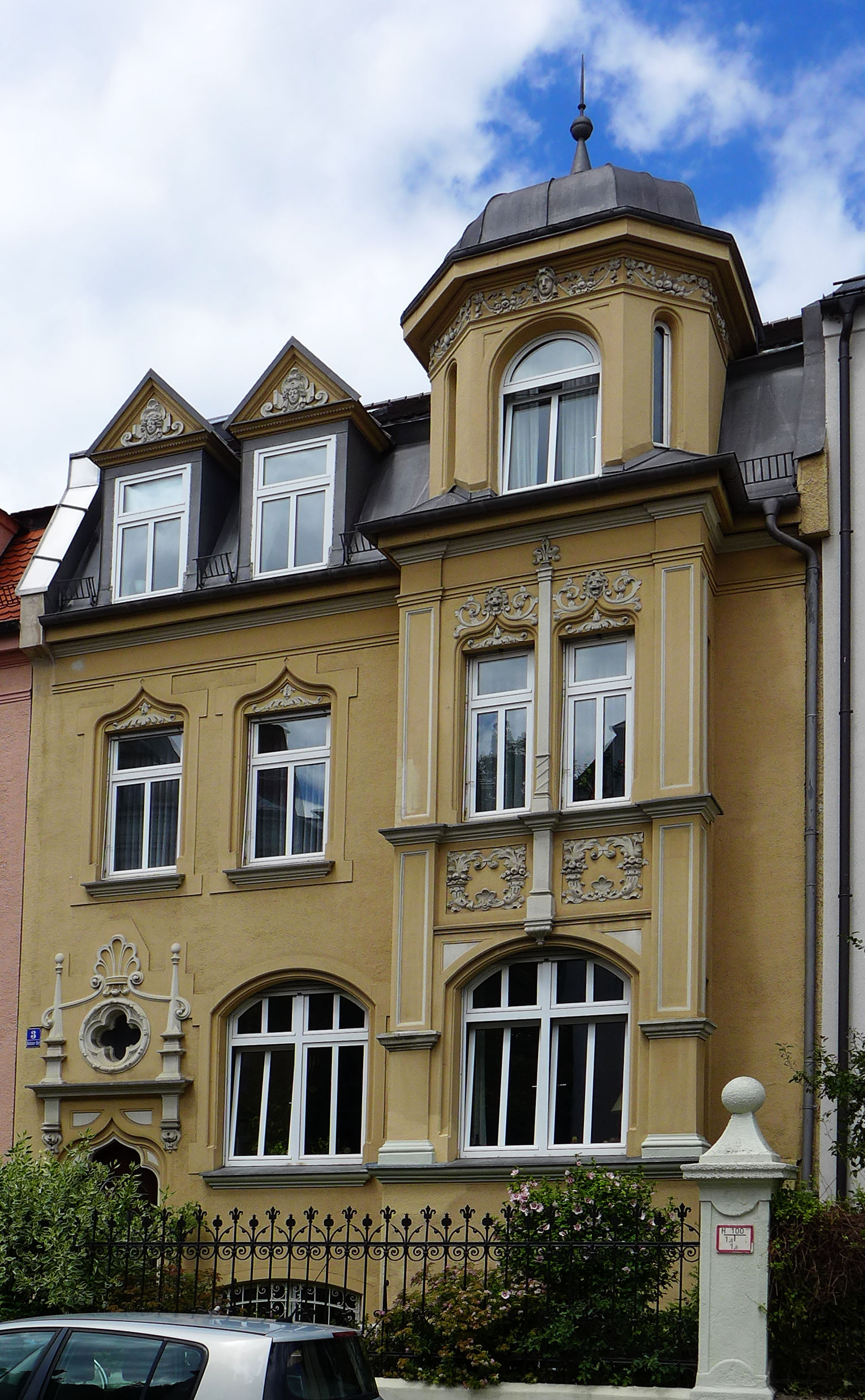 Bothmerstr. 3, München